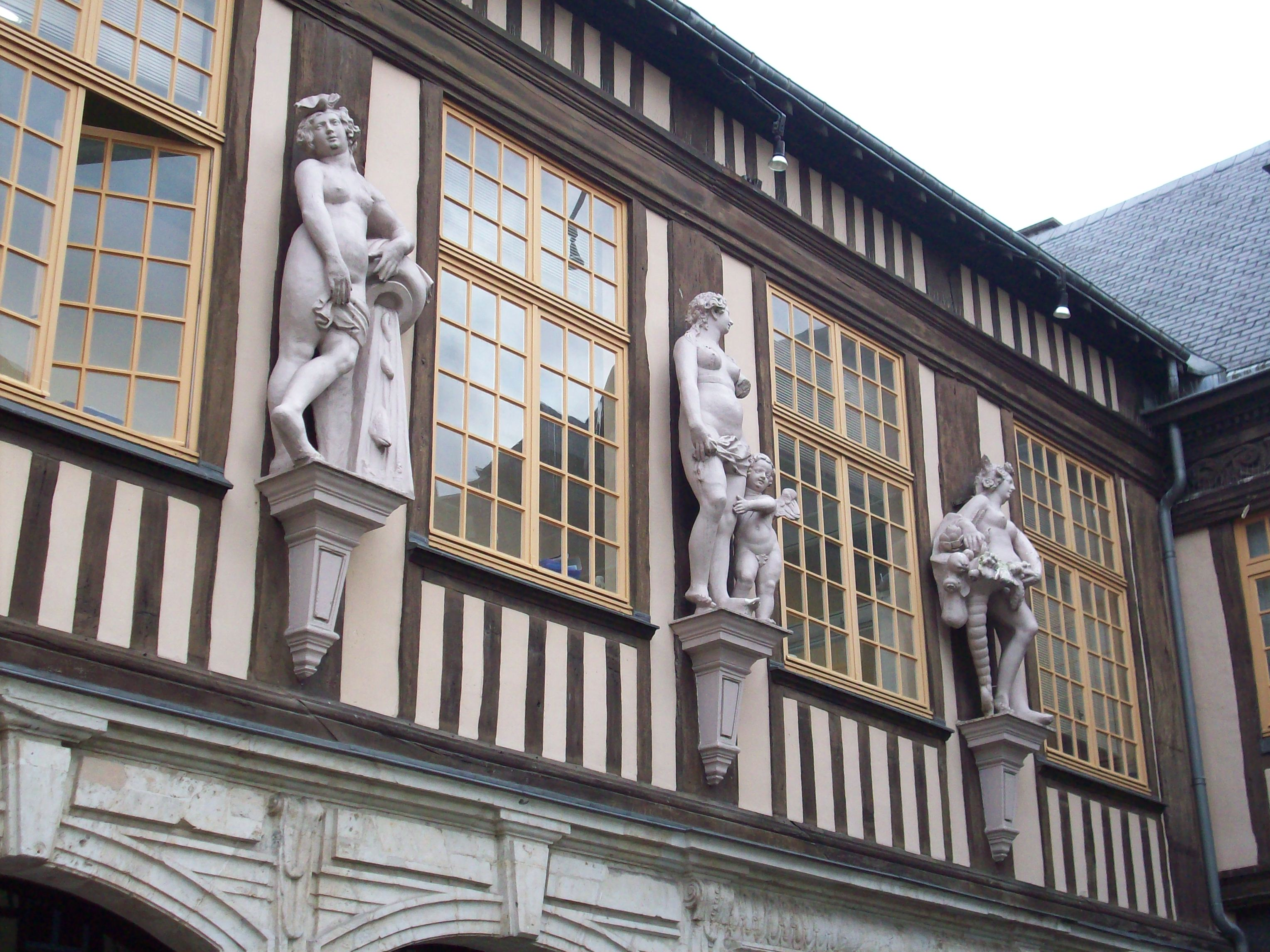 Statues de l'hôtel d'Étancourt.